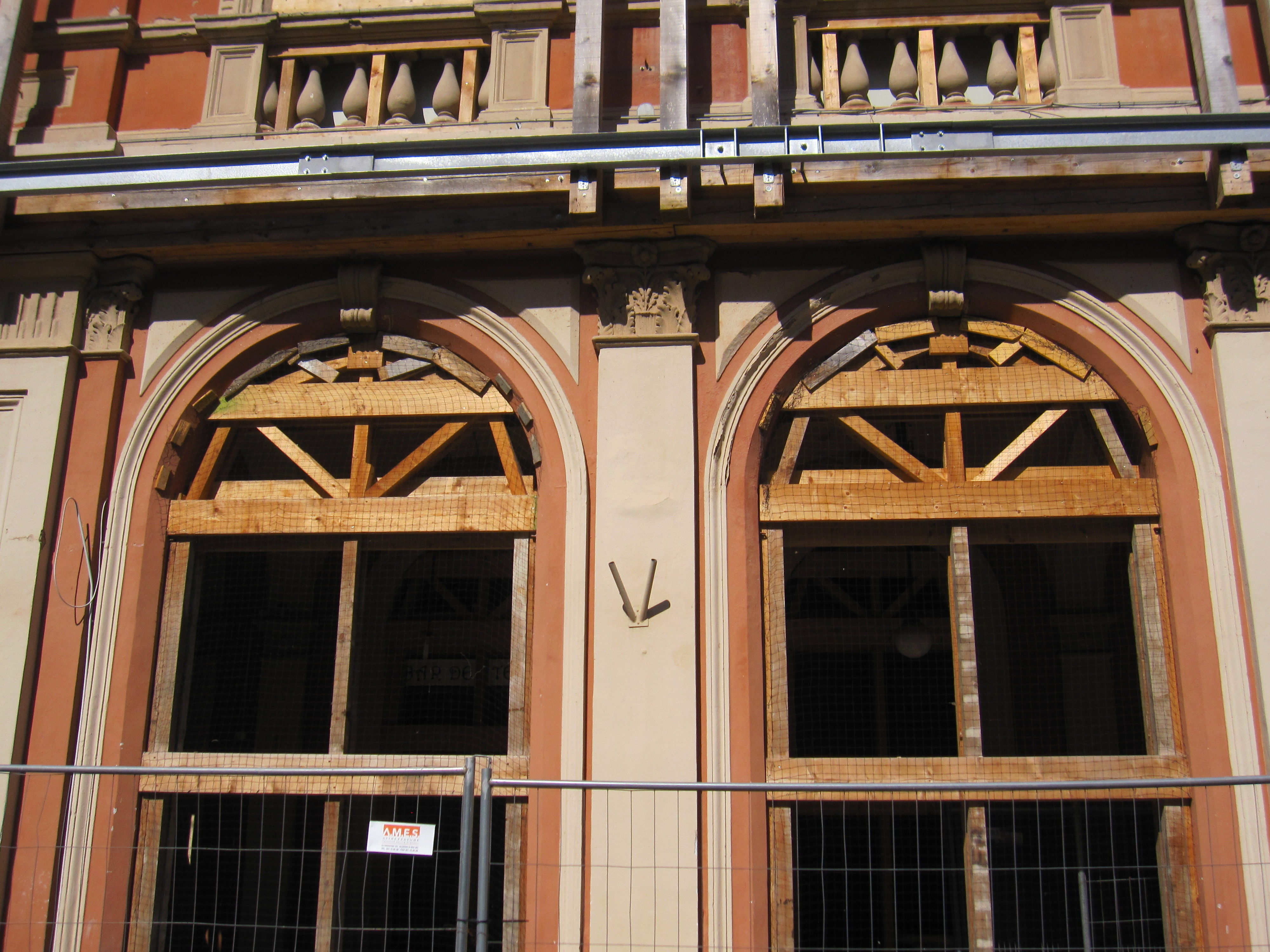 Teatro Comunale di Crevalcore This is a photo of a monument which is part of cultural heritage of Italy.